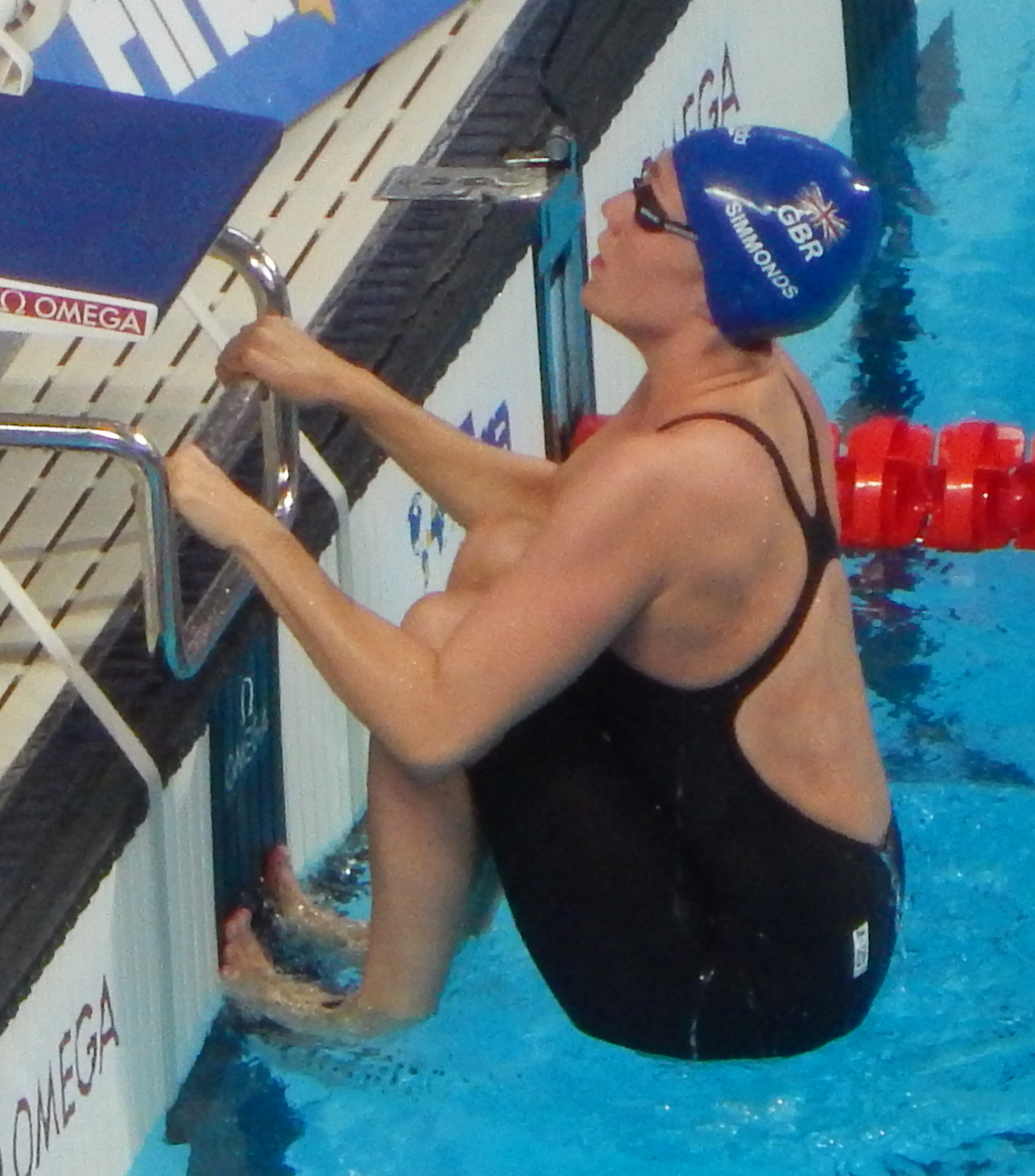 Элизабет Симмондc и Лиза Граф перед полуфиналом в Казани на 200 метров на спине